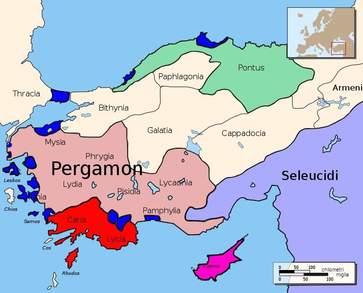 Cartina dell'Anatolia nel 188 a.C. blu: Stati greci liberi rosso: Territorio di Rodi rosa: Pergamo viola chiaro: Territorio seleucide viola lilla: Territorio egizio